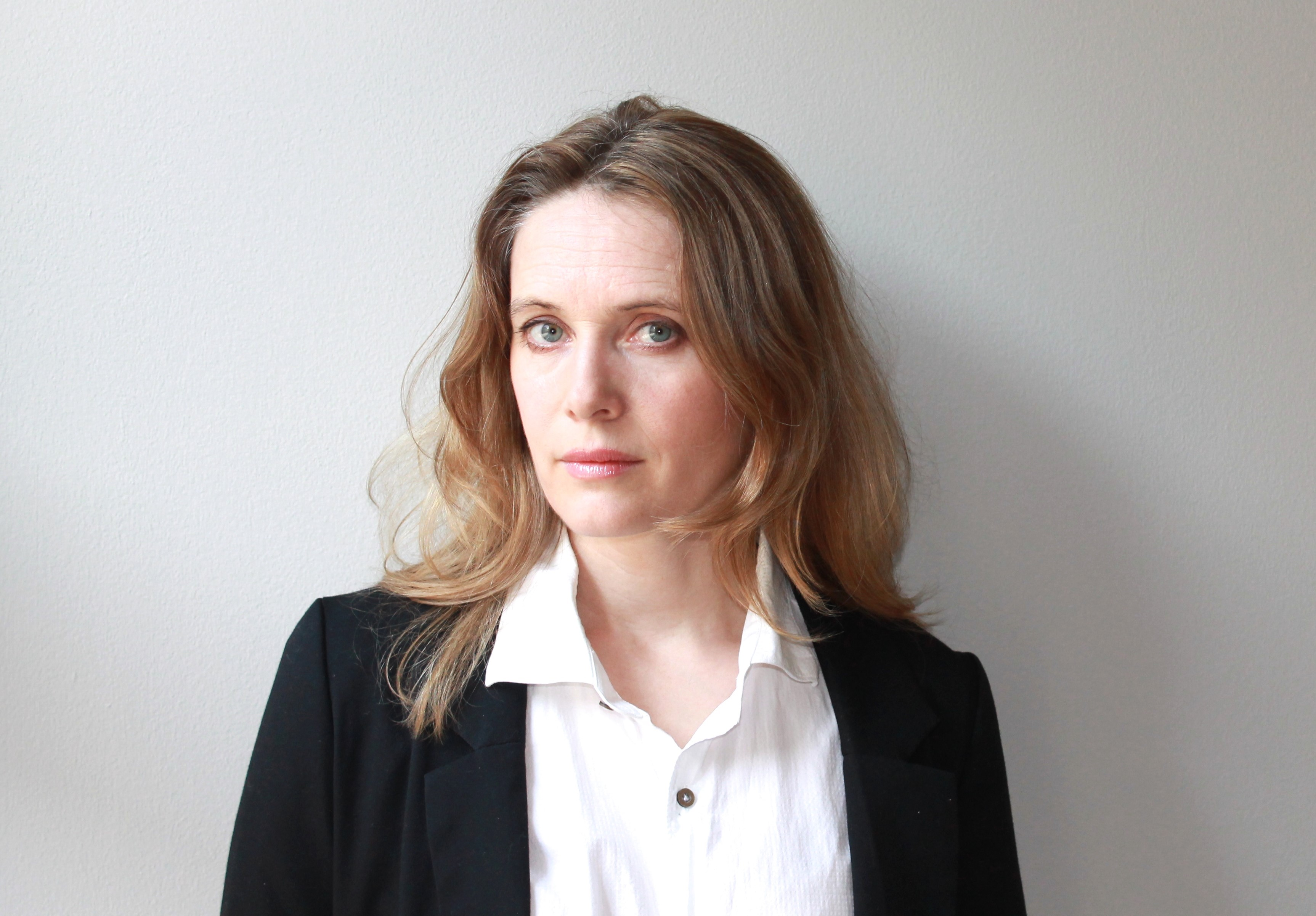 Skådespelaren Tuvalisa Rangström